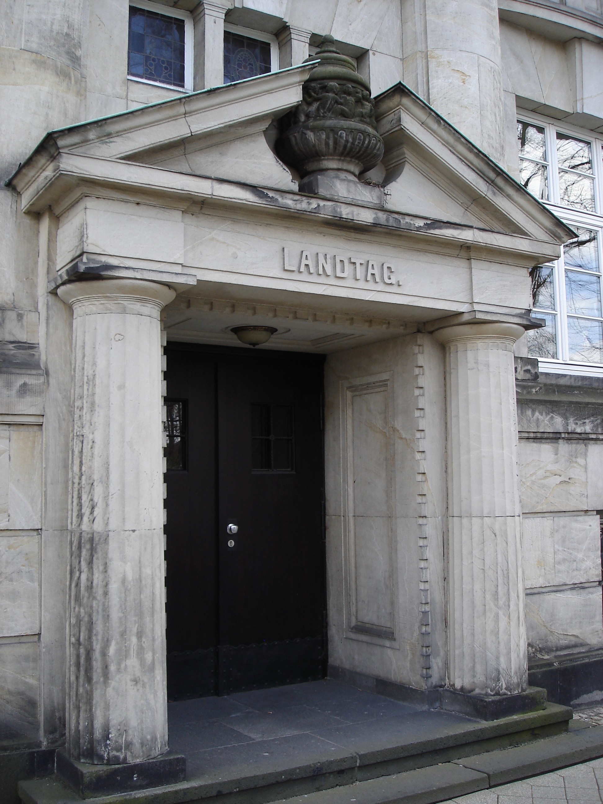 Landtag Lippe, Detmold, Nordrhein-Westfalen, Deutschland